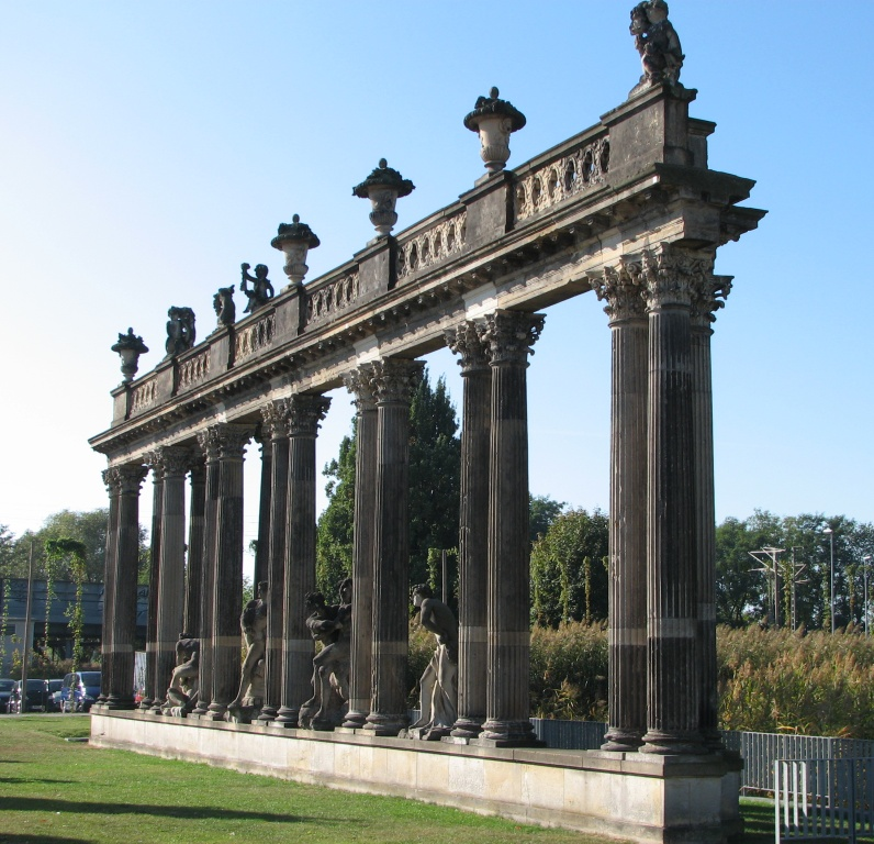 Ringerkolonnade im Potsdamer Lustgarten